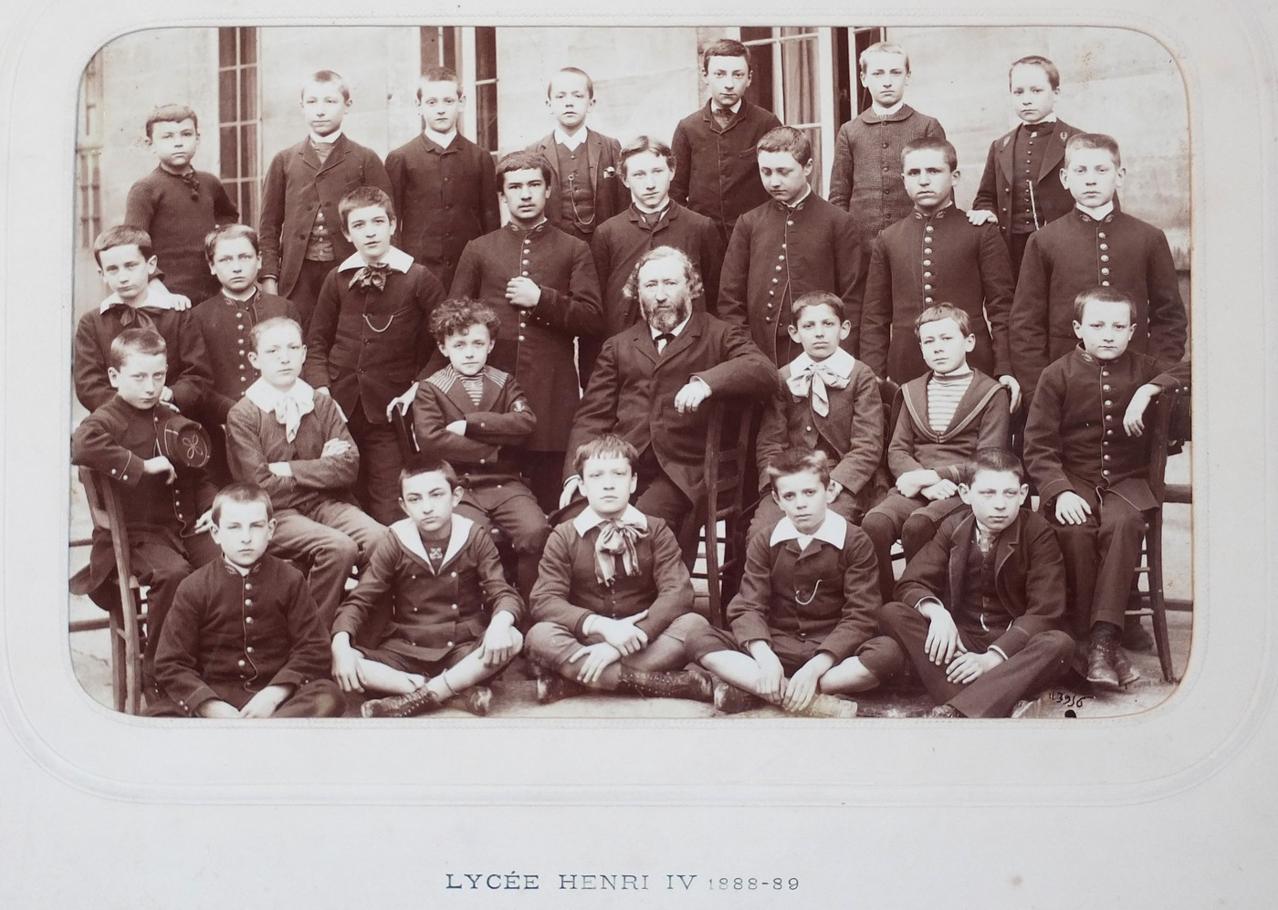 Photo d'une classe au lycée Henri IV en 1888-89 (Paris, 5e arrond.). Jules David, photographe à Levallois-Perret.